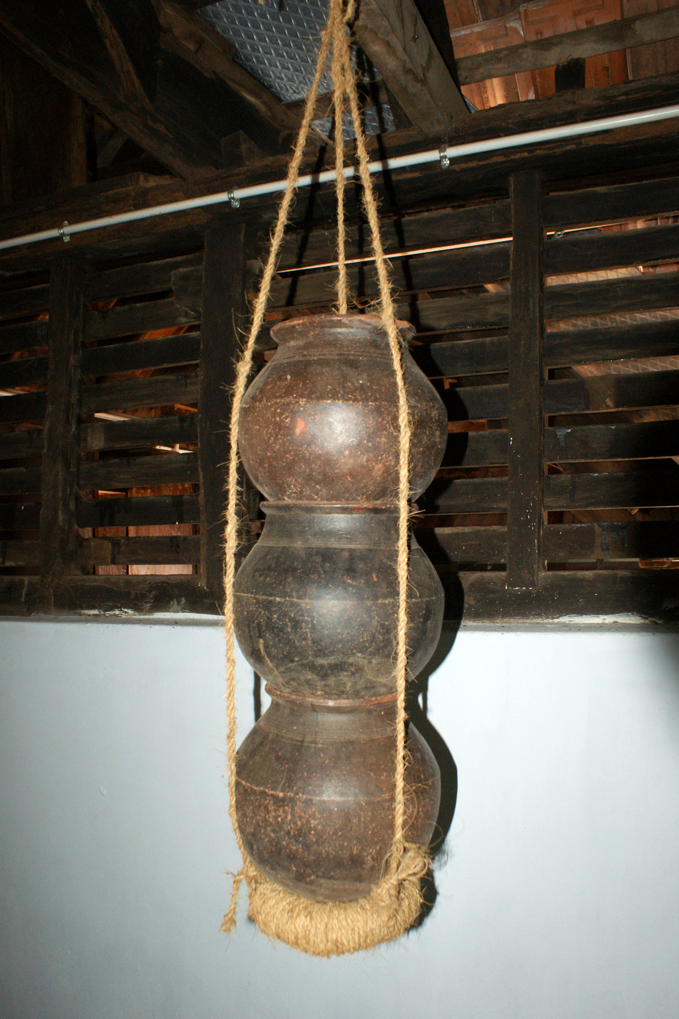 ഉറിയിൽ കലം അടുക്കിയിരിക്കുന്നു.